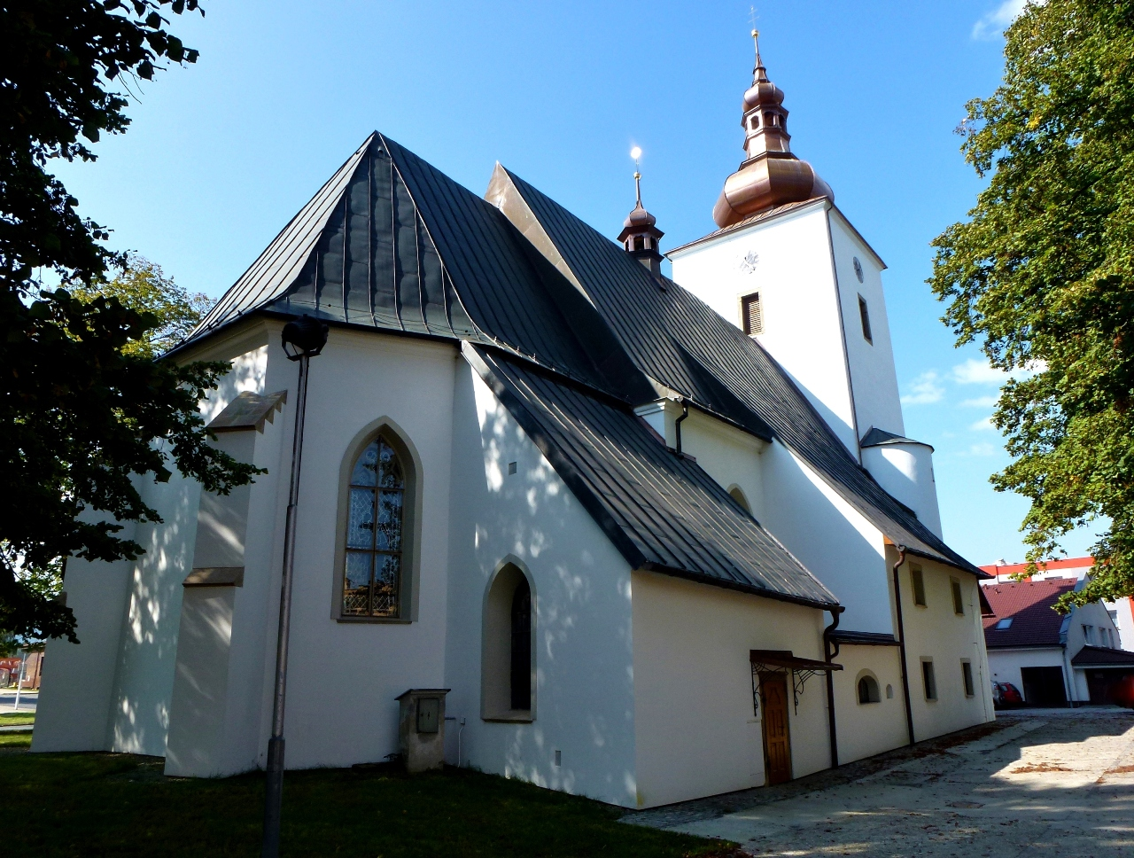 Kostel sv. Jana Křtitele, Horní, Frenštát pod Radhoštěm.